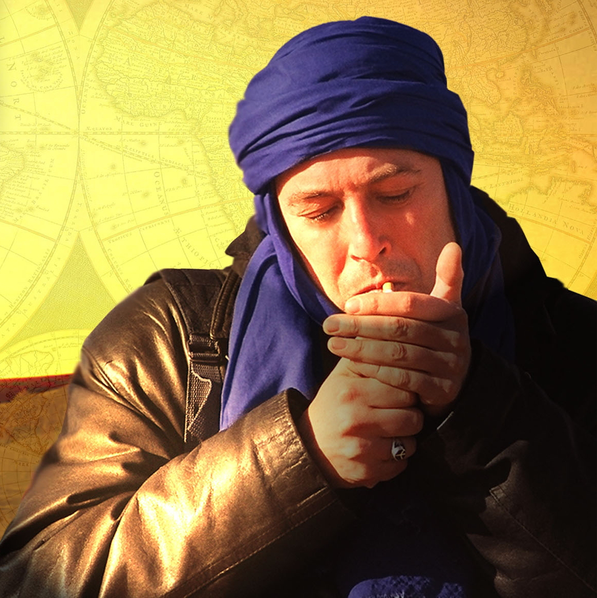 Foto de Ángel Petisme realizada por Fernando Íñiguez para el disco "Éxitos secretos"